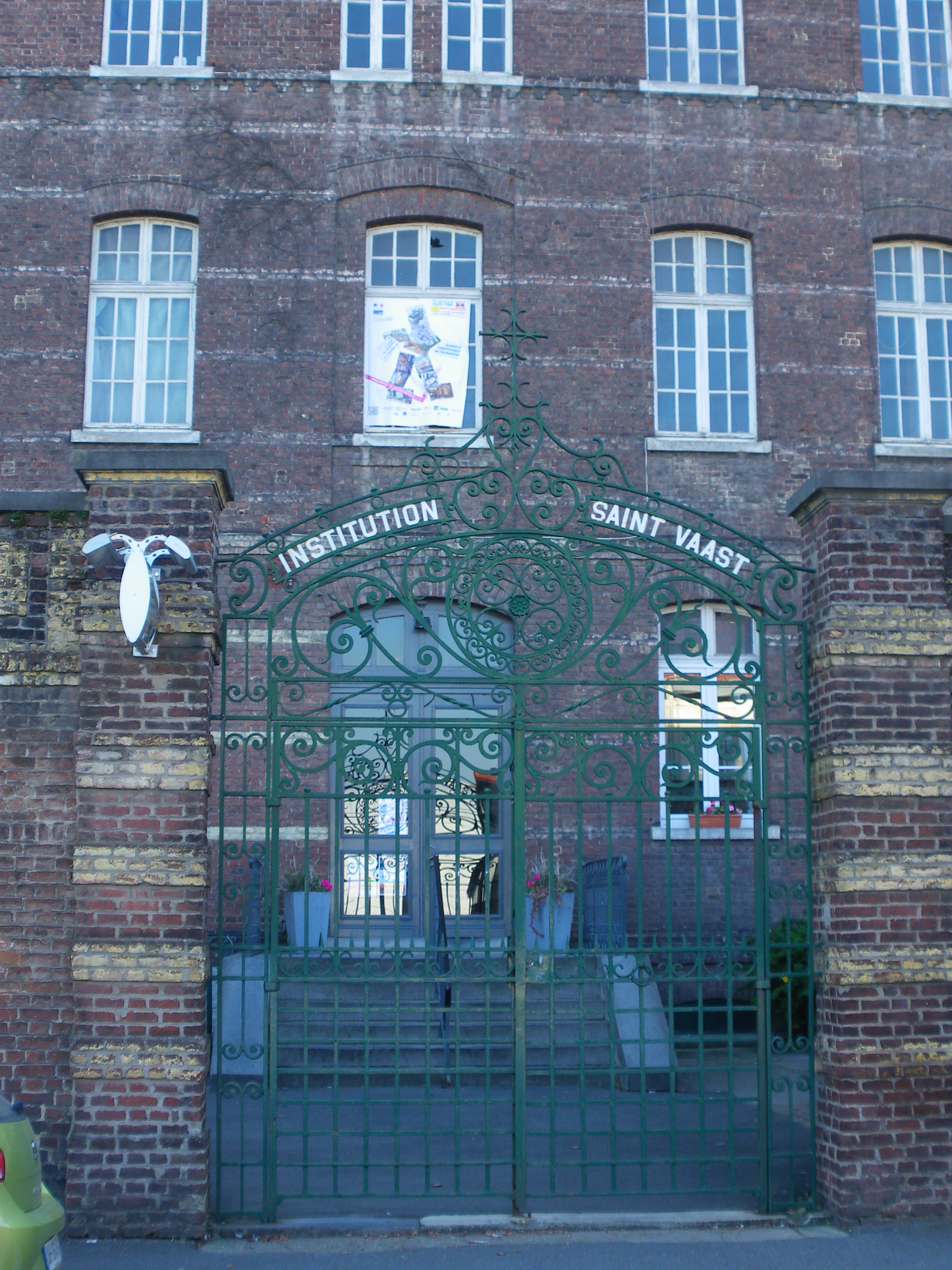 Vue de l'entrée principale du collège Saint-Vaast de Béthune